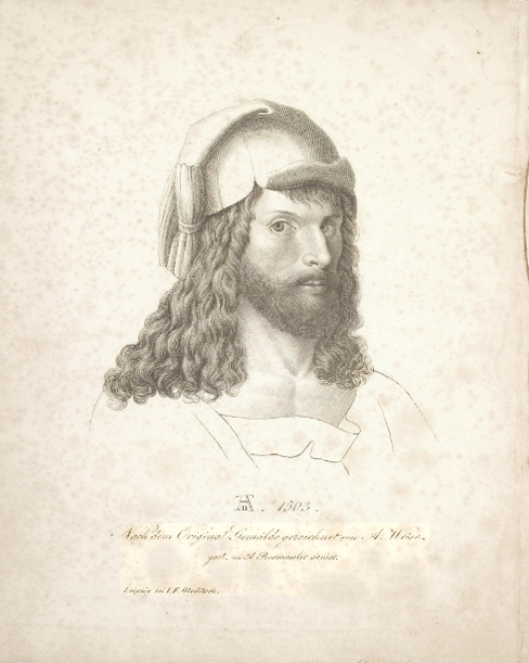 Adam Weise: Albrecht Dürer und sein Zeitalter: ein Versuch : Leipzig 1819